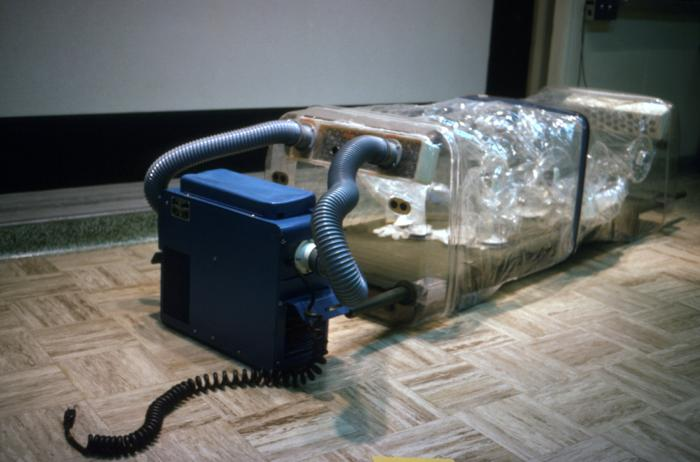 Isolationseinrichtung für Ebola-Infizierte 1976. Hersteller des Geräts war das Unternehmen Vickers Medical Ltd.